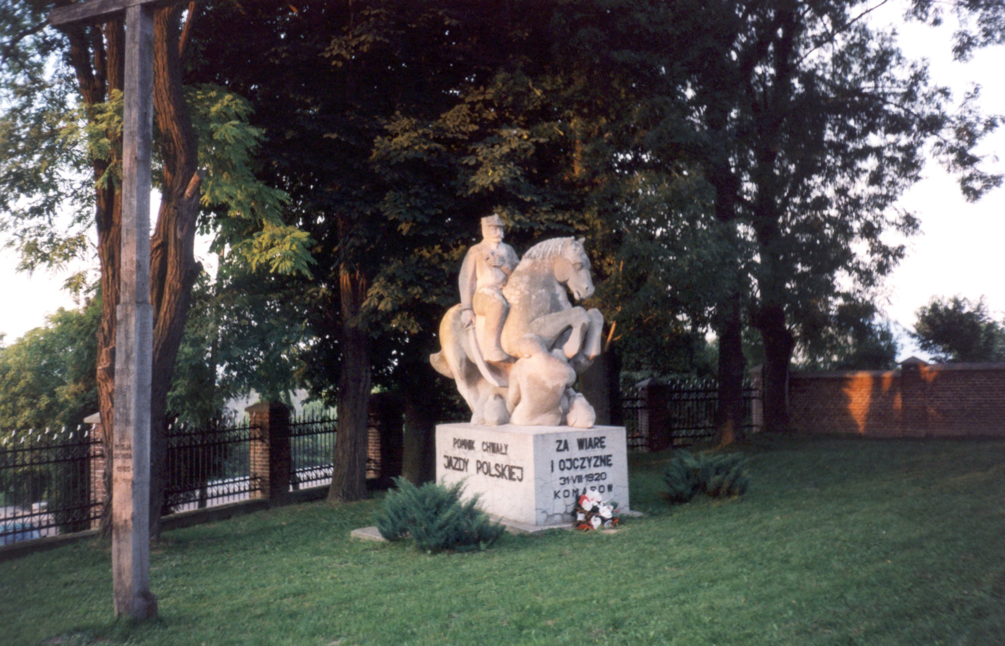 Komarów-Osada - pomnik upamiętniający bitwę pod Komarowem 31 sierpnia 1920; przed kościołem par. pw. Św. Trójcy